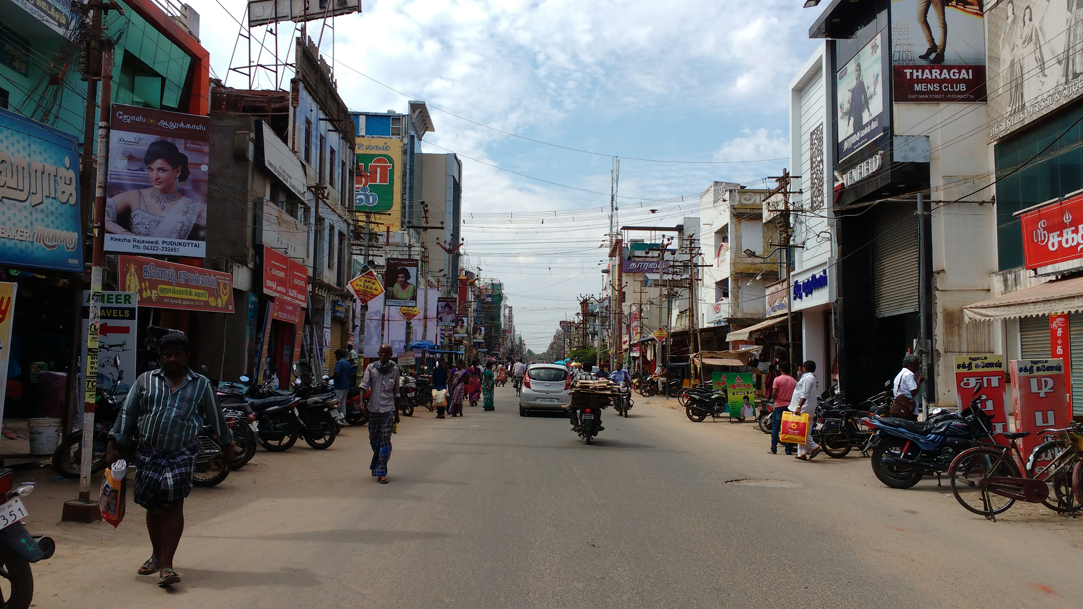 கீழ ராஜ வீதி புதுக்கோட்டை